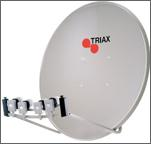 Foto Antena Multihaz Offset